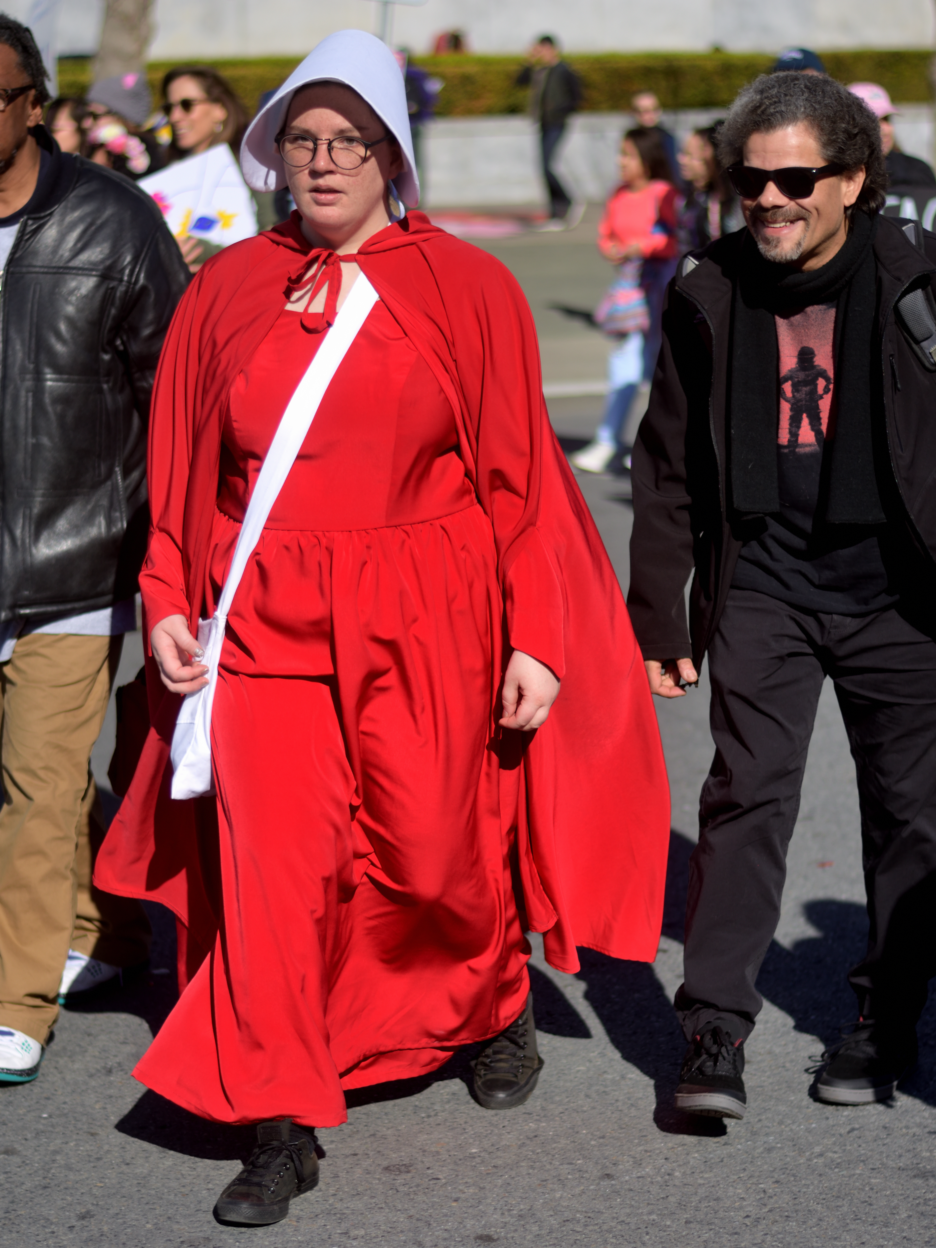 Handmaid